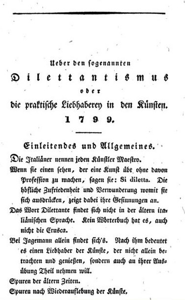 Erste Seite der fragmentarischen Schrift Über den sogenannten Dilettantismus oder die praktische Liebhaberey in den Künsten von Eckermann nach Aufzeichnungen von Goethe und Schiller.